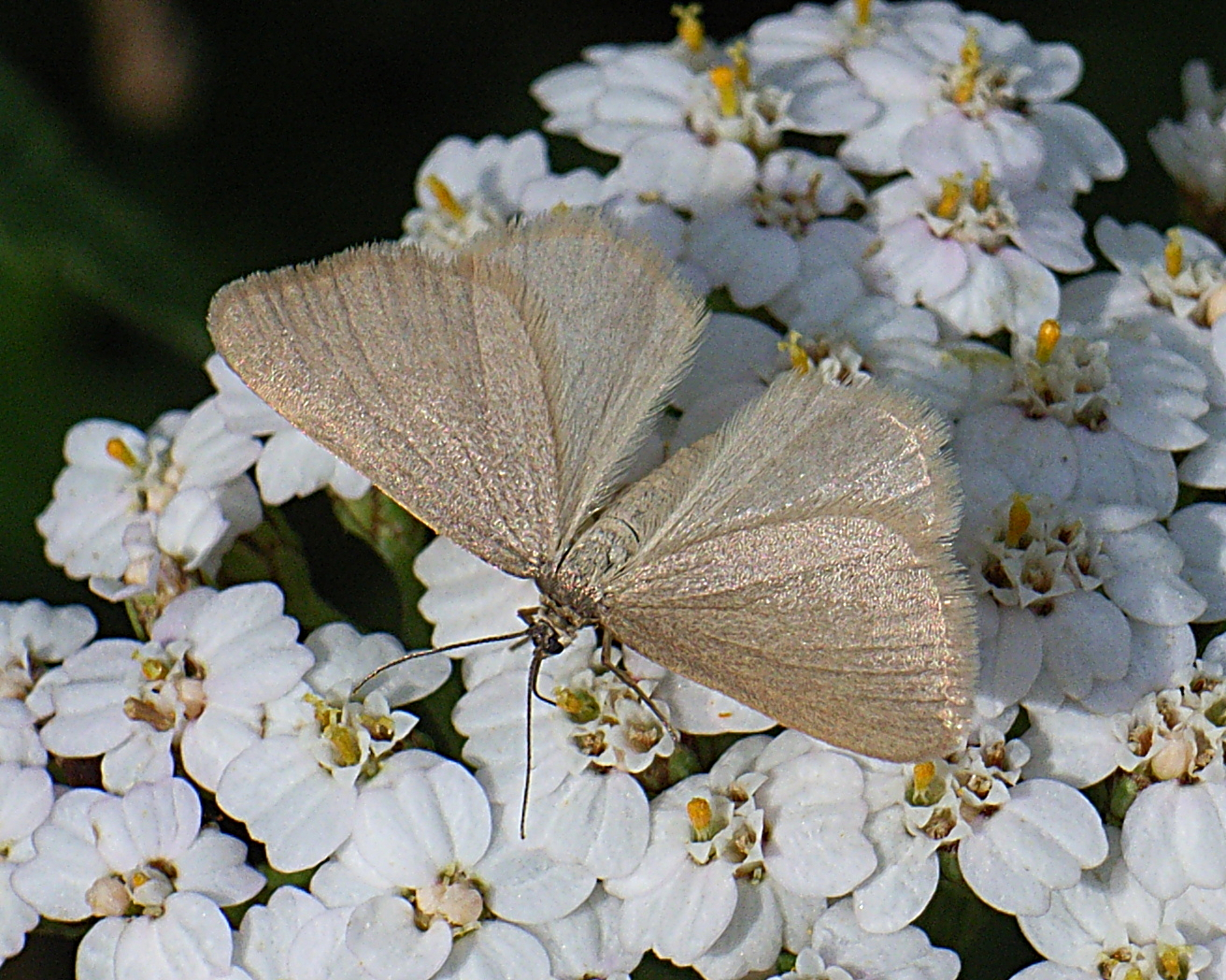 Minoa murinata, Wolfmilchspanner